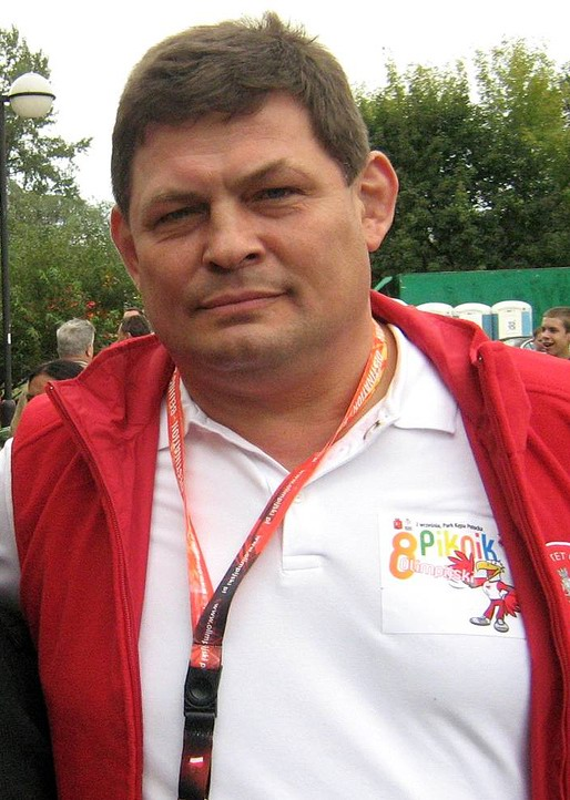 Roman Bierła - polski zapaśnik, medalista olimpijski